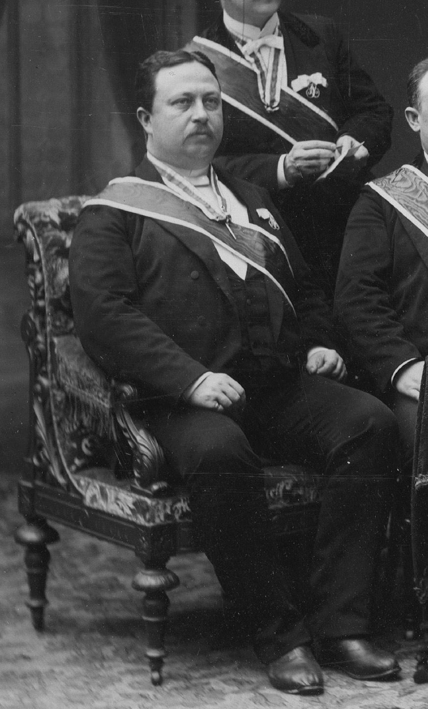 Carl Sjöström (1851-1918), svensk stadsfogde och personhistoriker. Detalj ur gruppbild.